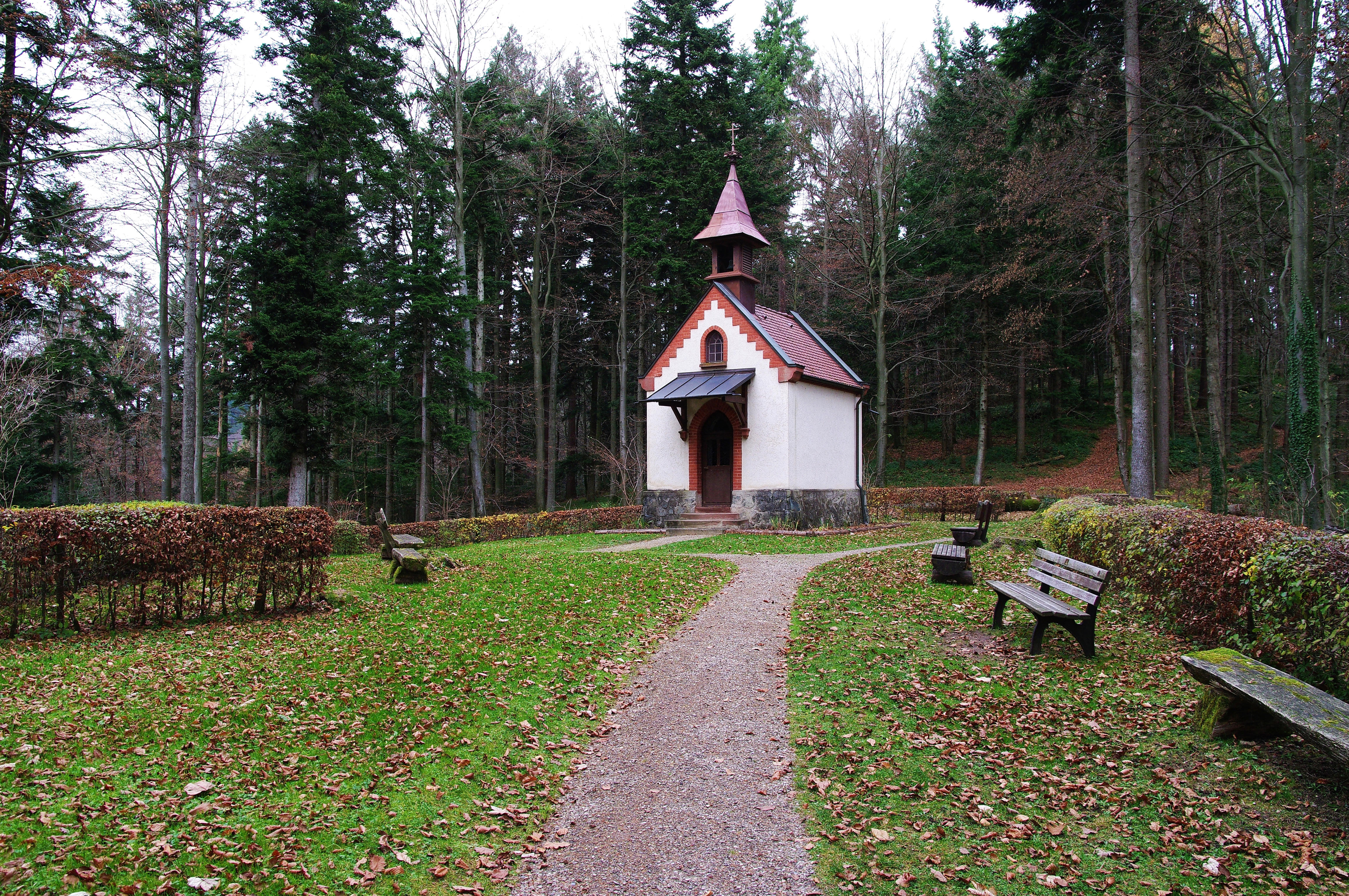 St. Wendelin (Freiburg) Lage der Kapelle auf einer großen Wallichtung